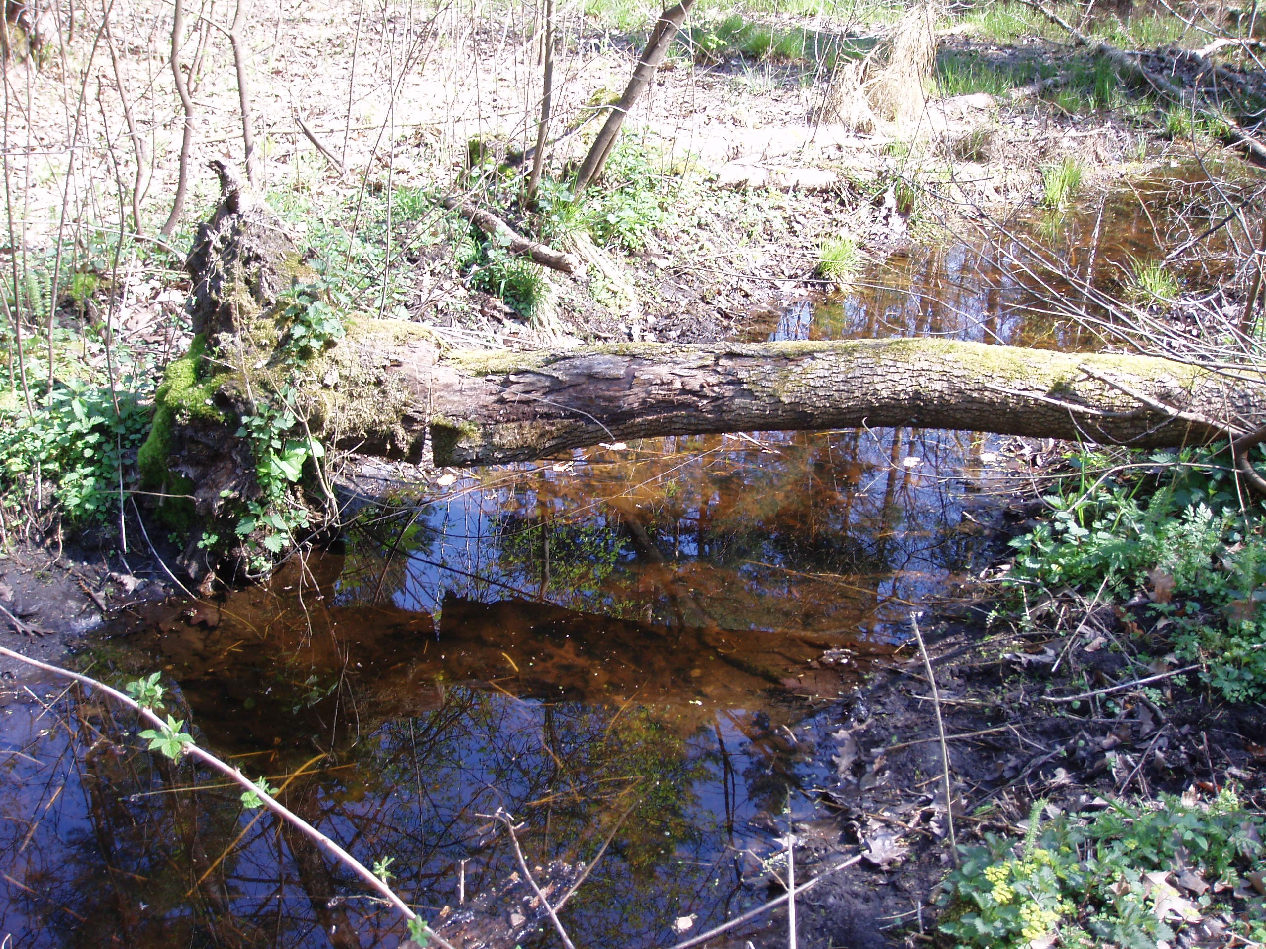 Las mieski w Olsztynie, zbiornik okresowy